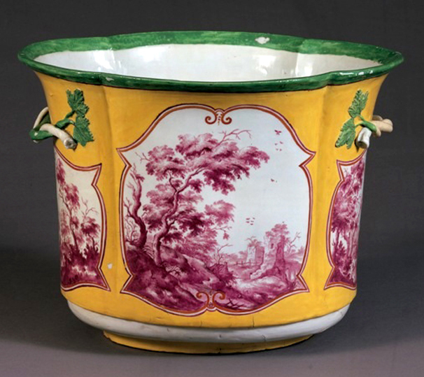 Weinkühler